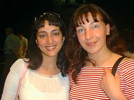 Sofia Leko und Anna Dergatschova-Daus, Pressezentrum der Dortmunder Schachtage 2004.